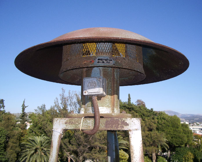 Η Σειρήνα ΝΕΒΑ 55